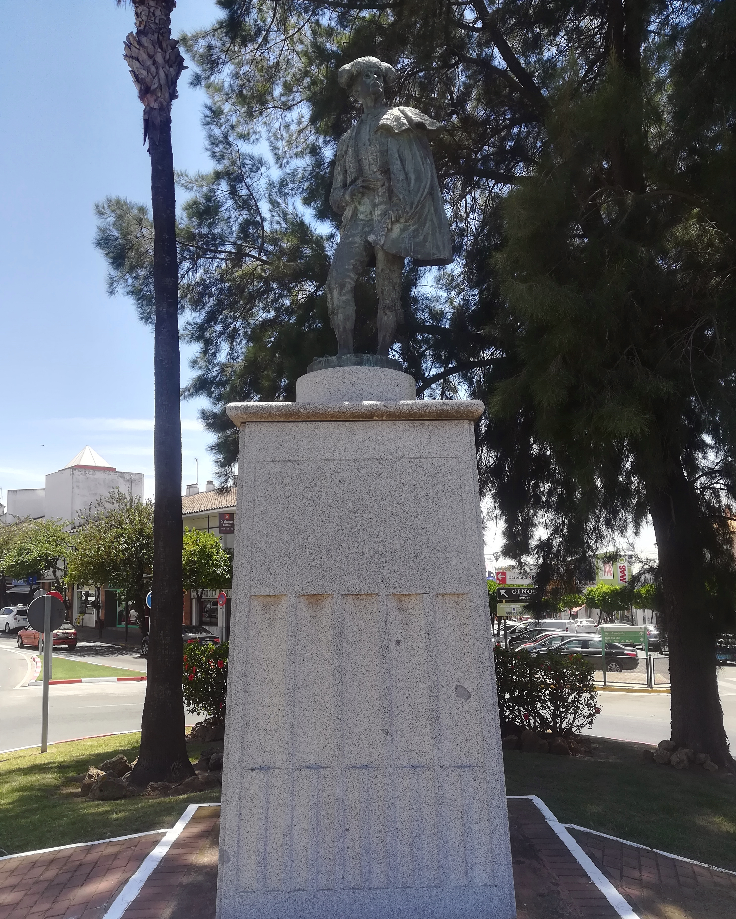 Monumento al Ricardo Torres Reina. Tomares, provincia de Sevilla, Andalucía, España.